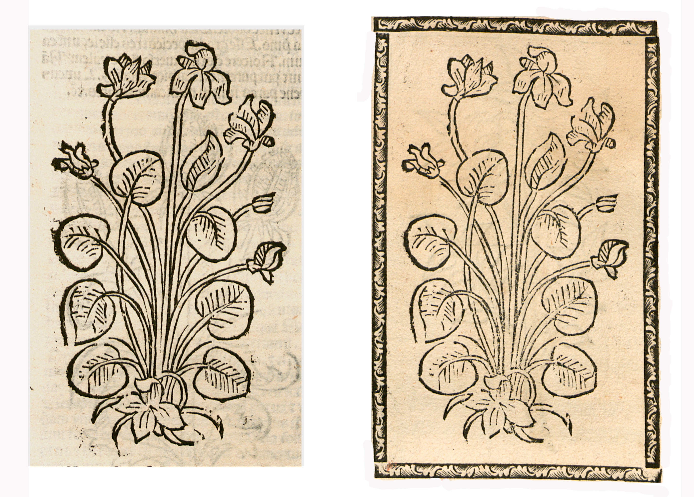 Abbildung von: Ranunculus ficaria